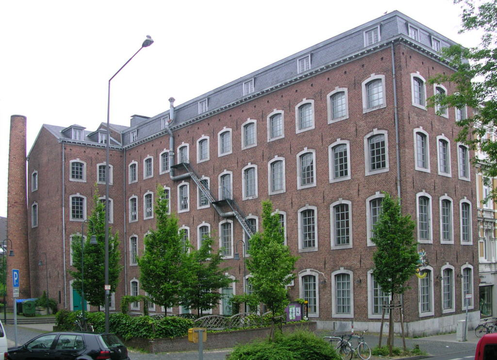 Aachen, ehemalige Tuchfabrik Startz, heute Kulturzentrum